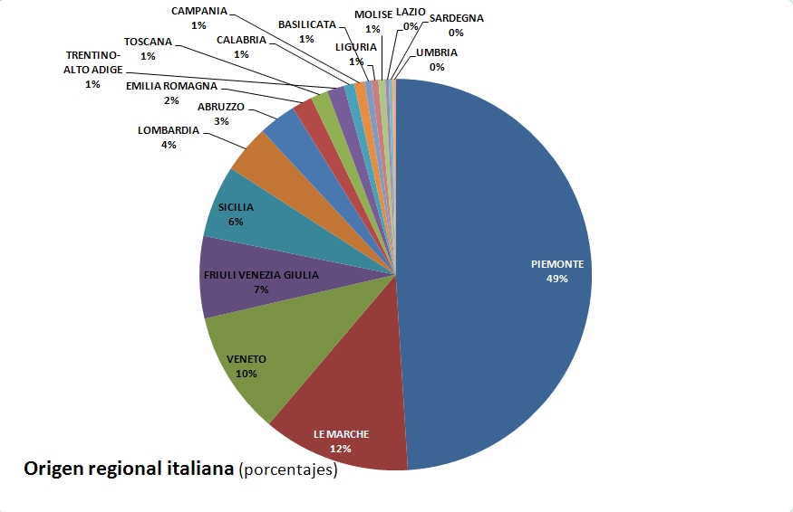 Distribuciòn por regiòn de origen de los descendientes de italianos en la zona de villa del rosario